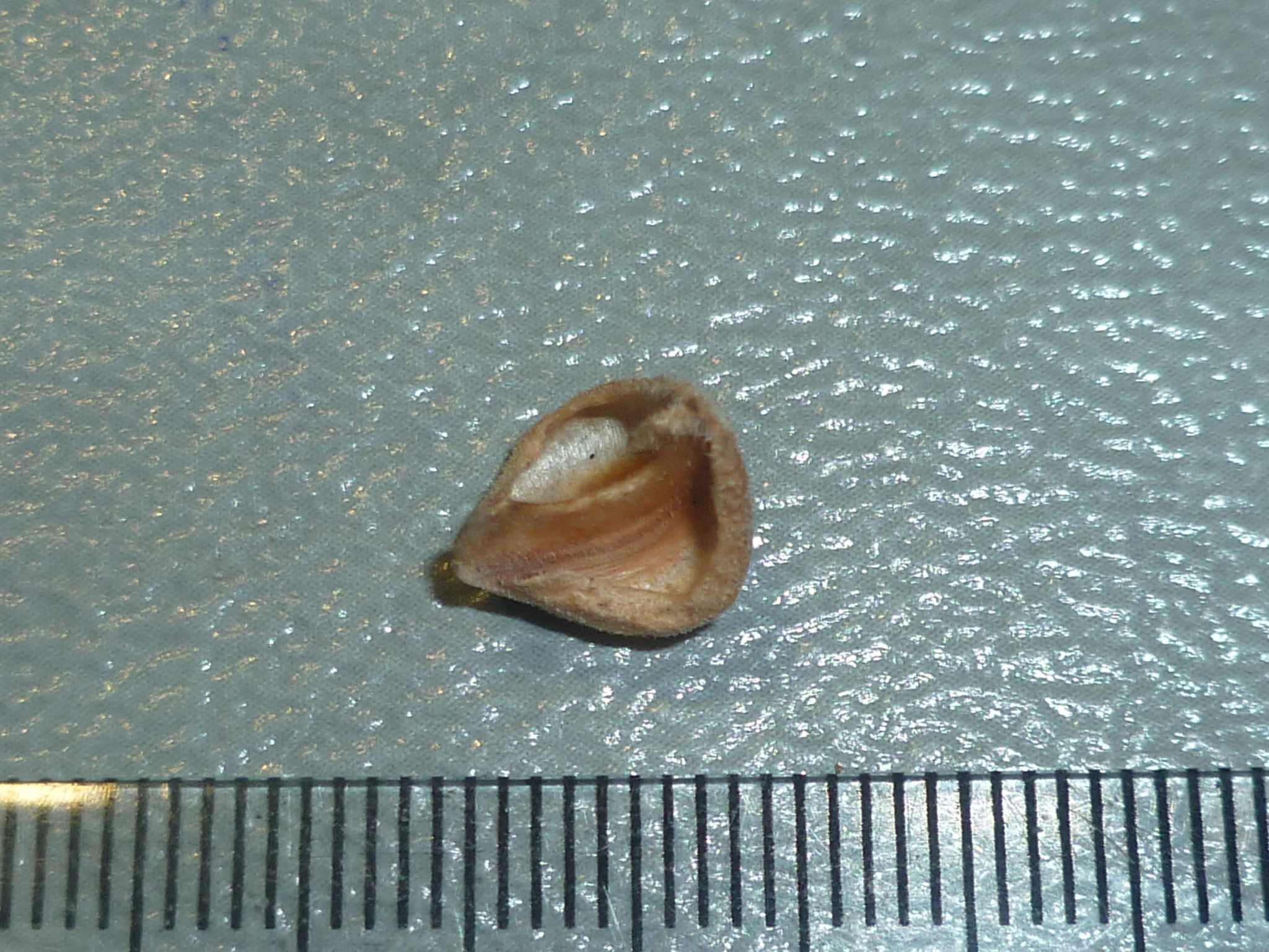 akène périphérique plat de calendula officinalis